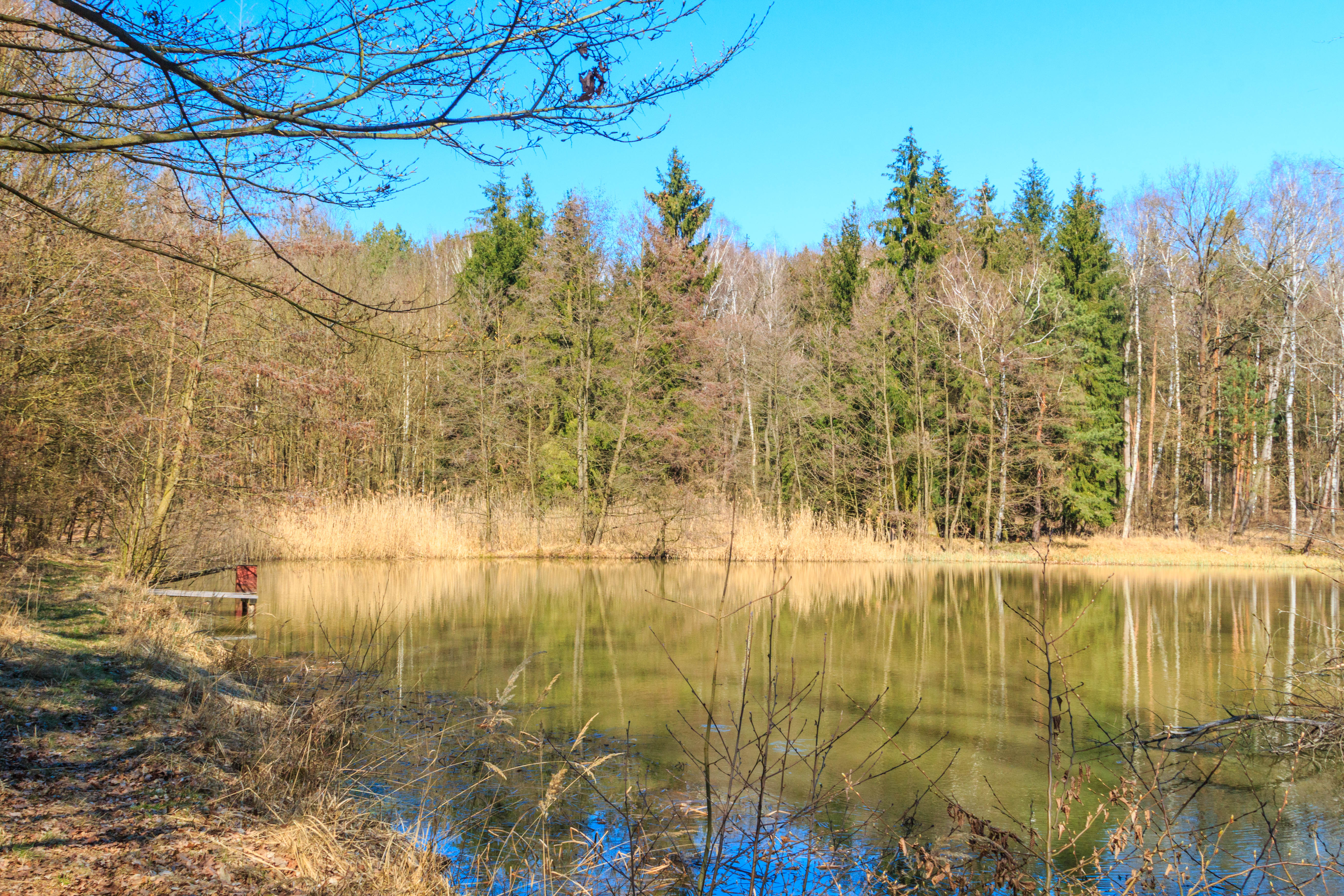 Lesní rybníček Žid u Kunčic v okrese Hradec Králové Project: Vodstvo.